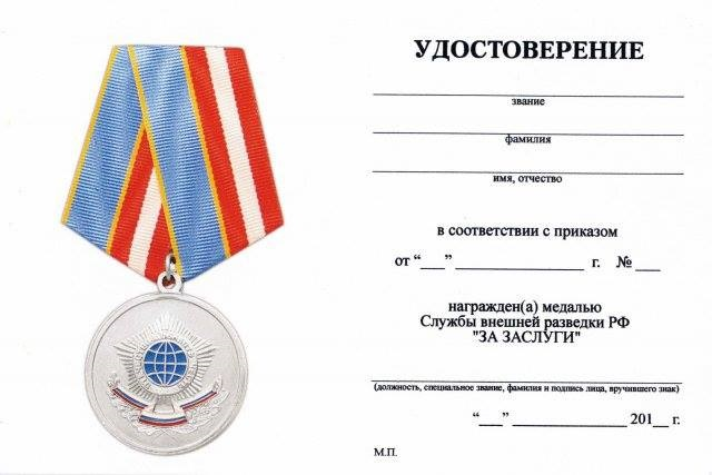 Удостоверение к медали «За заслуги» (СВР)